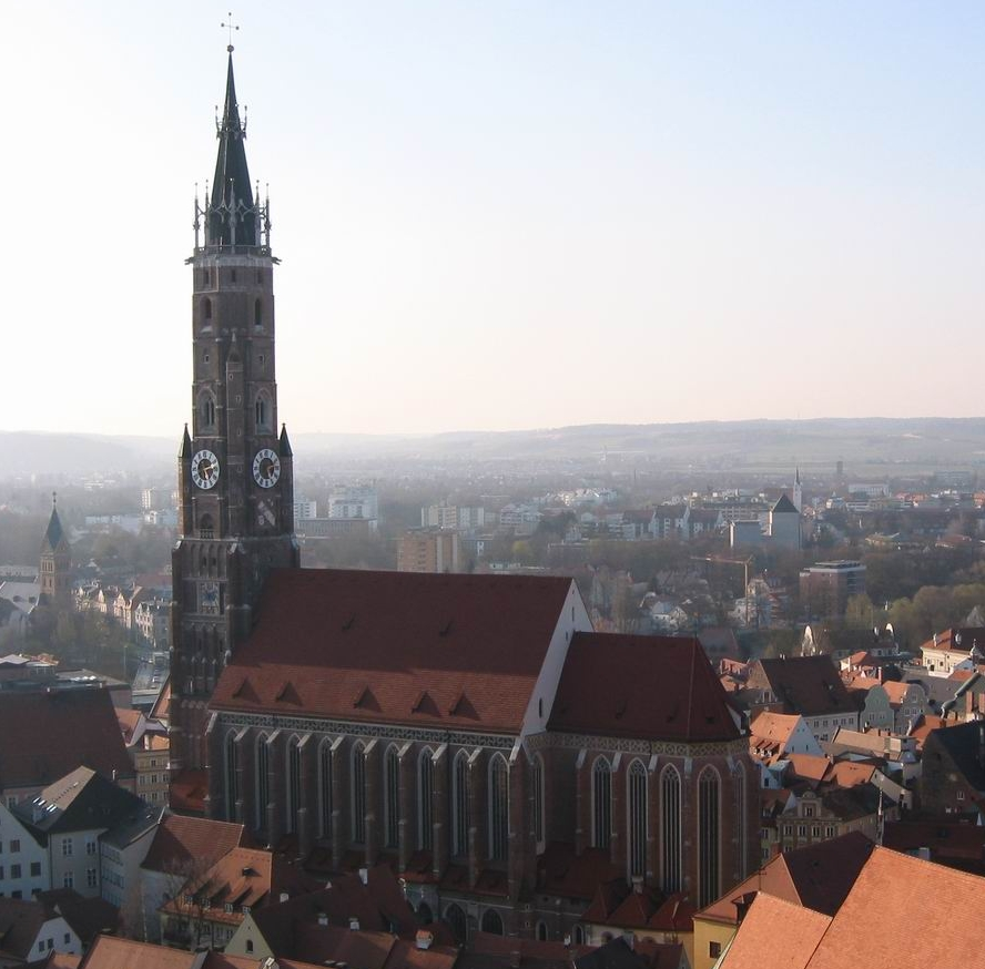 Martinskirche in Landshut, vom Hofberg („Schanzl“) aus gesehen. Oktober 2002